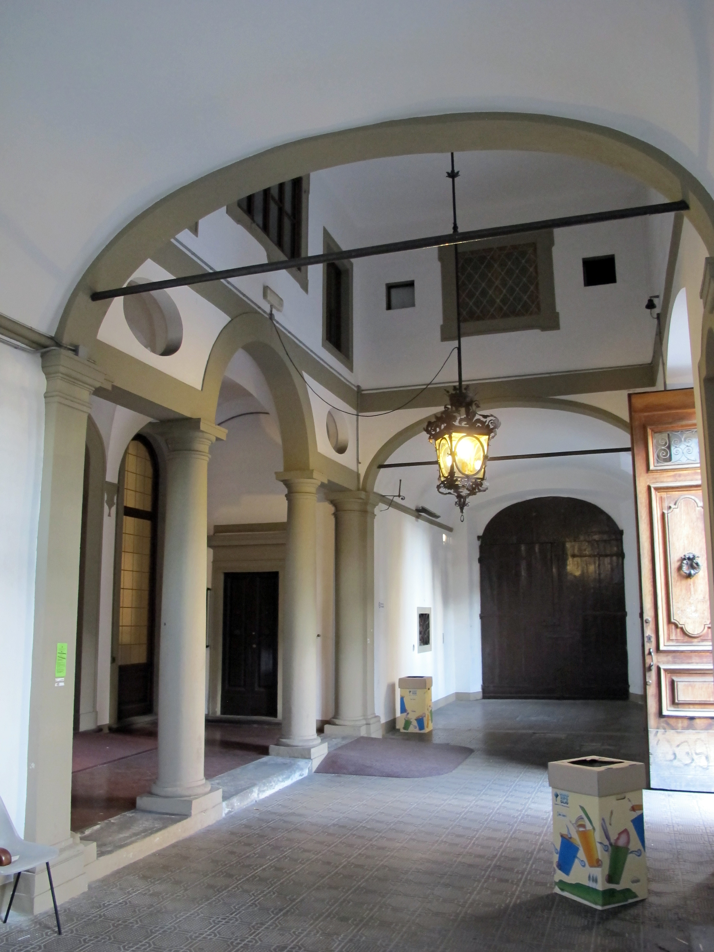 Palazzo di San Clemente, Firenze